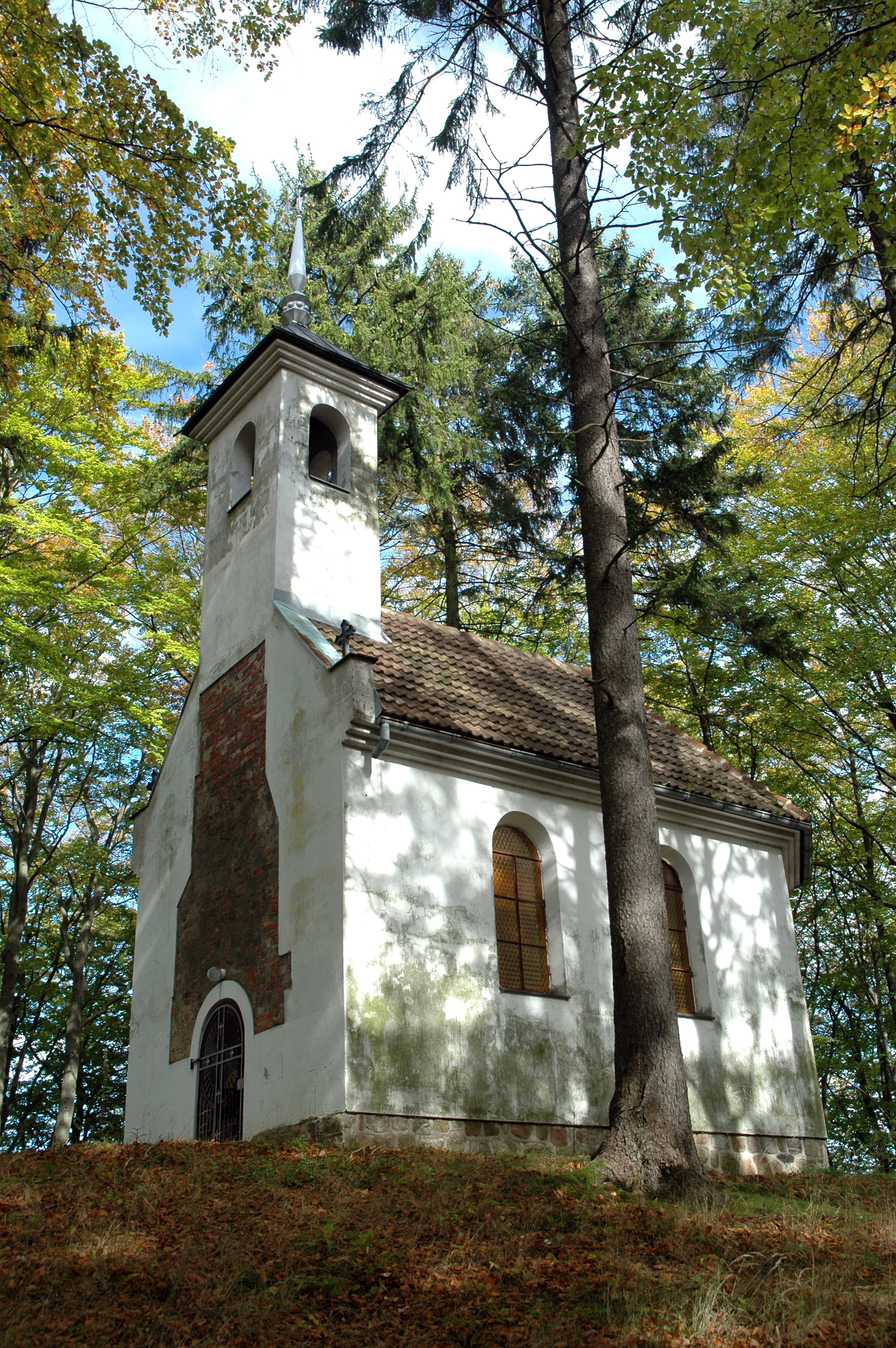 Kartuzy - kaplica p.w. Świętego Krzyża, 1653, 1989